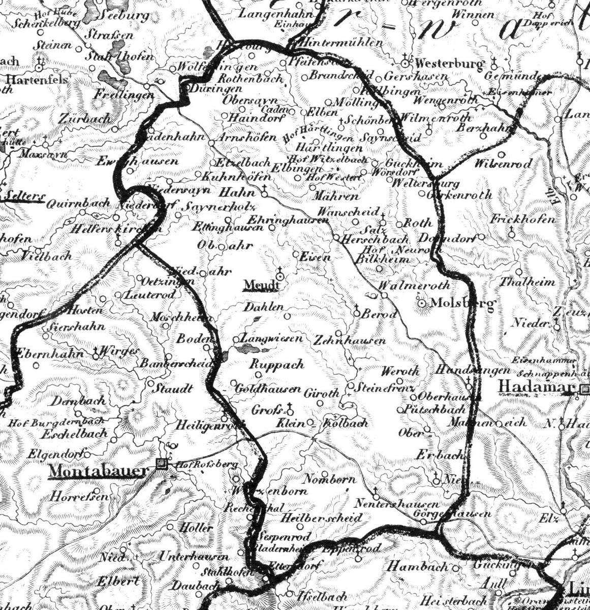 Amt Meudt 1828 (später Amt Wallmerod)